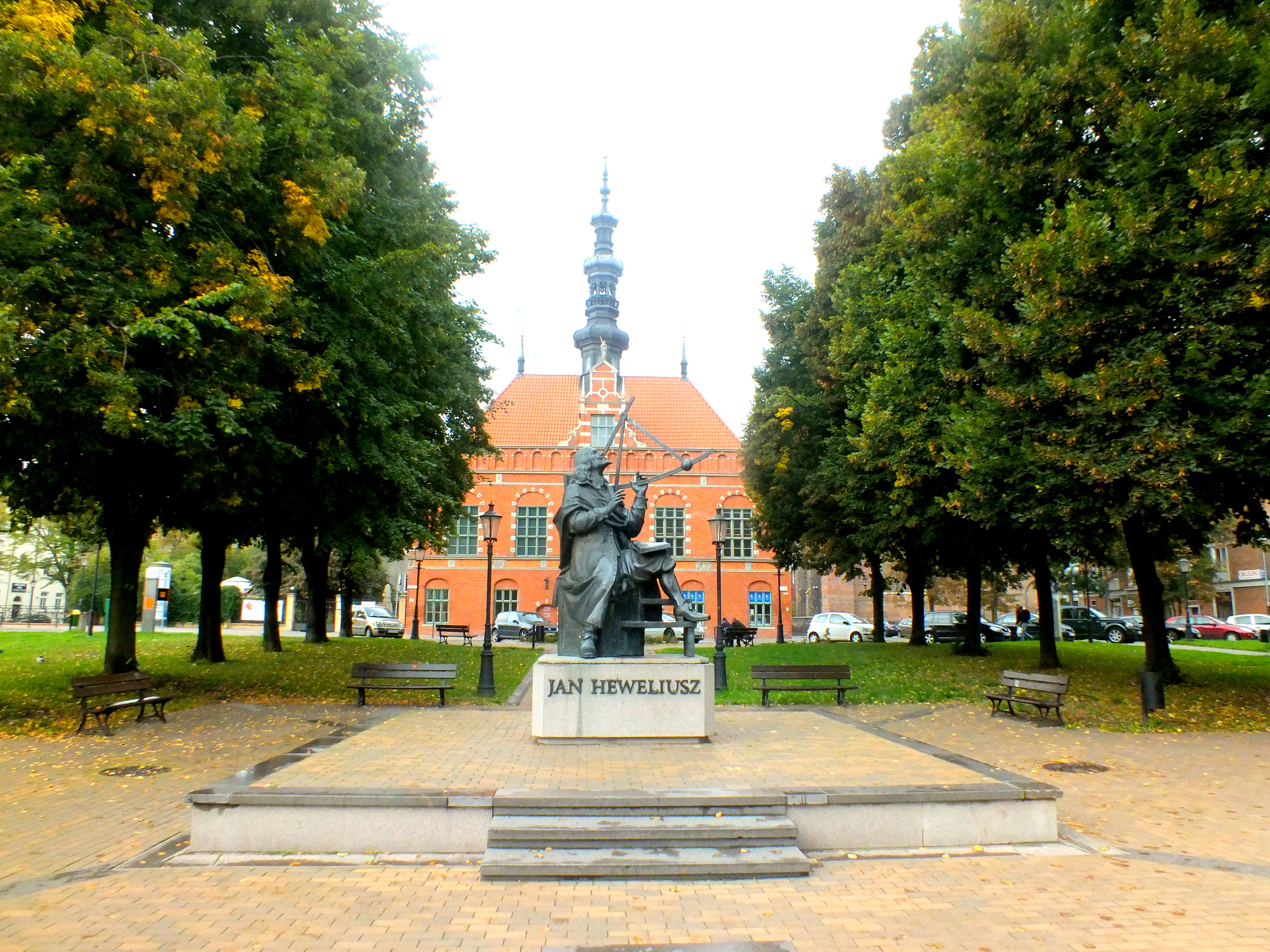 Gdańsk, pomnik astronoma na skwerze Zieleniec Heweliusza przed Ratuszem Staromiejskim